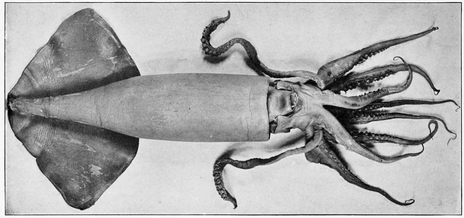 Dosidicus gigas